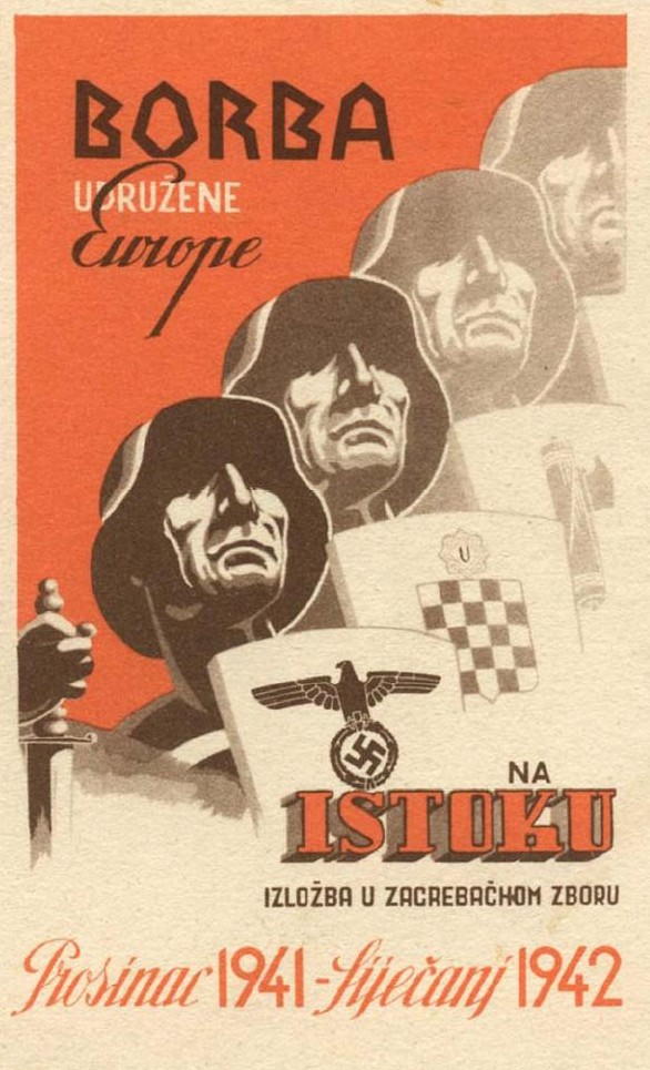 plakat kojim se najvaljuje izložba "Borba udružene Europe na istoku" u NDH